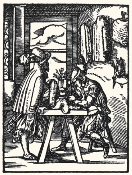 Der Pantzermacher Holzschnitt aus: Jost Amman (1539-1591): Eygentliche Beschreibung aller Stände auff Erden hoher und nidriger, geistlicher und weltlicher, aller Künsten, Handwerken und Händeln ... (erstmals Frankfurt am Main 1568; auch bekannt als: Das Ständebuch) Im Buch wird das Bild von folgendem Text von Hans Sachs begleitet: Ich bin ein Pantzermacher frembd, Ich mach die Stählen Pantzerhembd, Auch PantzerErmel und Pantzerstrich, Die man tregt, offen und heimlich, Auch von Pantzer gut Stählen Krägn, Ich kan auch Pantzer rolln und fegn, Wo sie mit Rost anlauffen thon, Midias Pantzermachn fieng an. Bemerkungen: Der Vers "Midias Pantzermachn fieng an" soll auf den Ursprung des Panzermacherhandwerks in antiker Zeit verweisen. Der Hinweis auf Midias bleibt unklar, es könnte sich wie bei anderen Gedichten der Sammlung eher um eine Herkunftsbezeichnung als um einen Namen handeln.